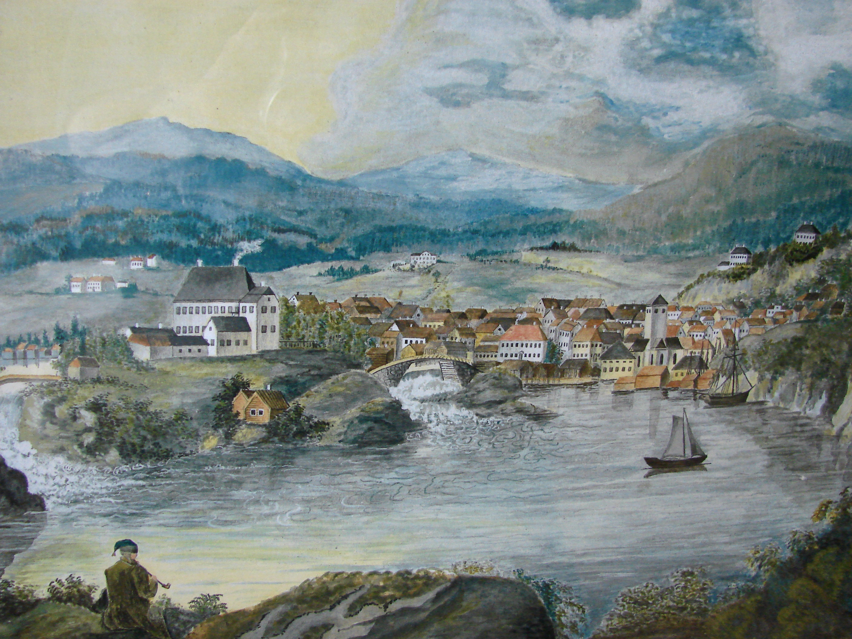 Skien af F.(?) Steibet (?), Søndre Brekke Gaard, Skien, Telemarken, Norge